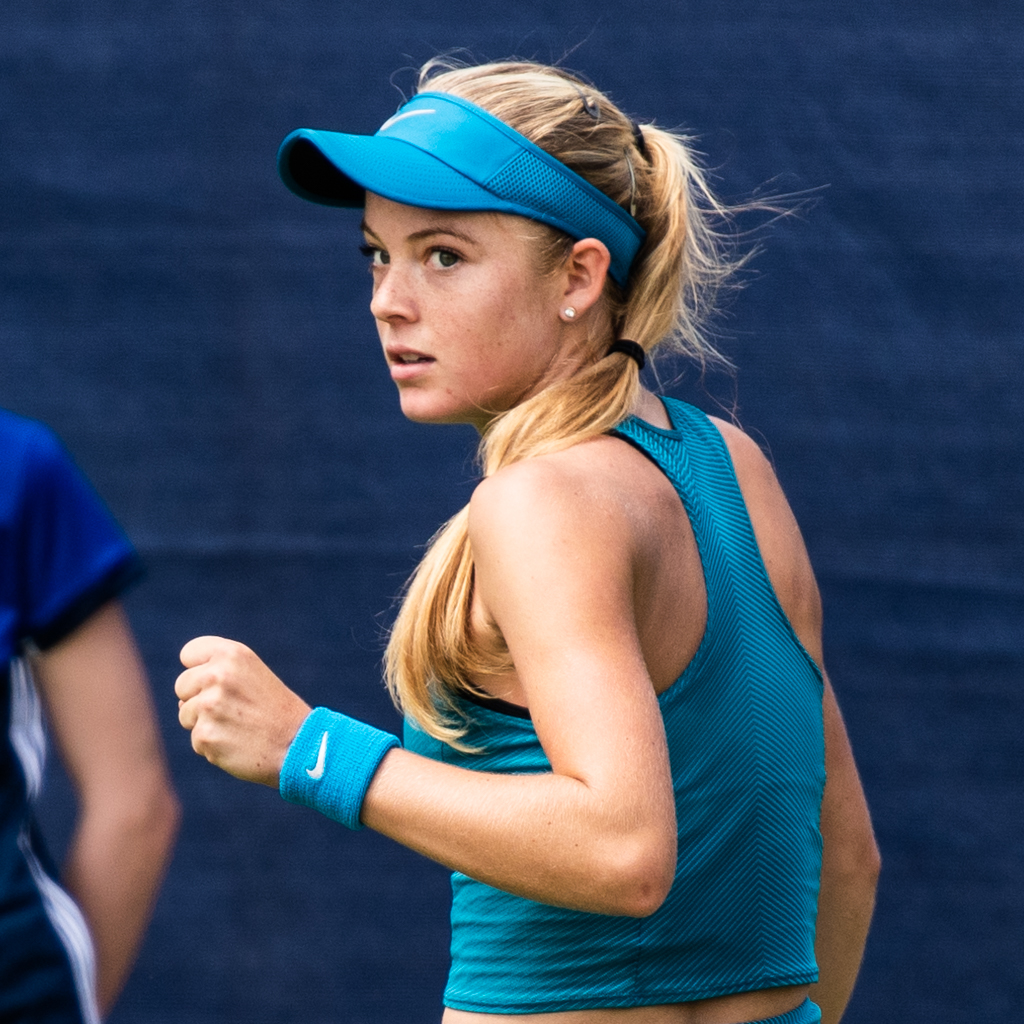 Katie Swan